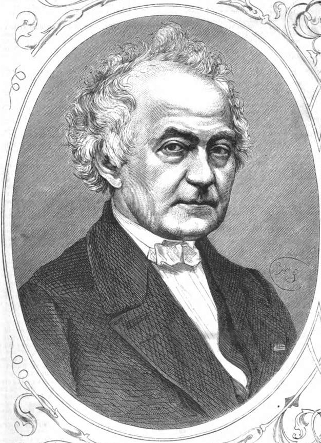 Heinrich Leberecht Fleischer, deutscher bedeutender Orientalist im 19. Jh.